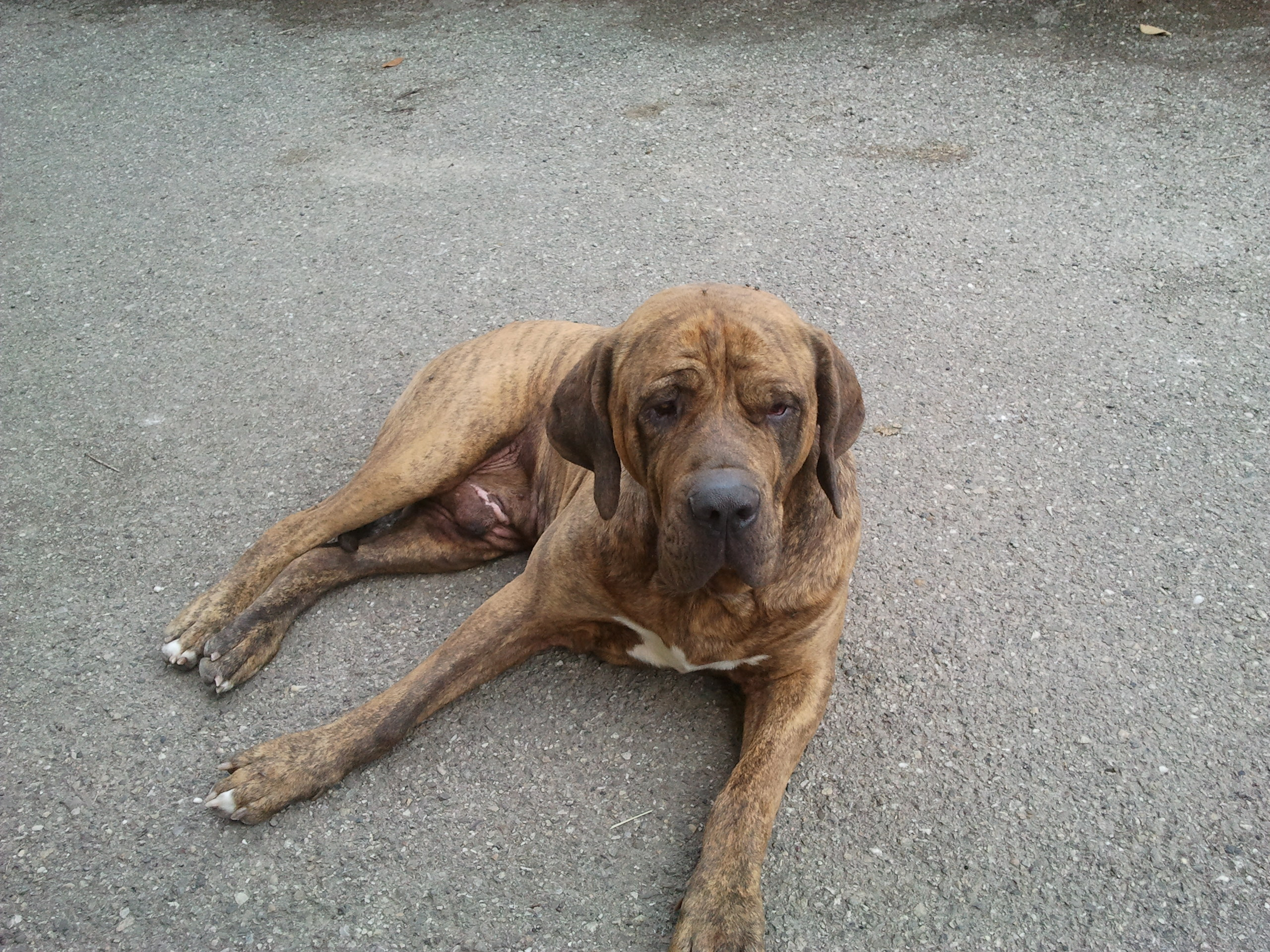 Arcos, Fila brasileiro